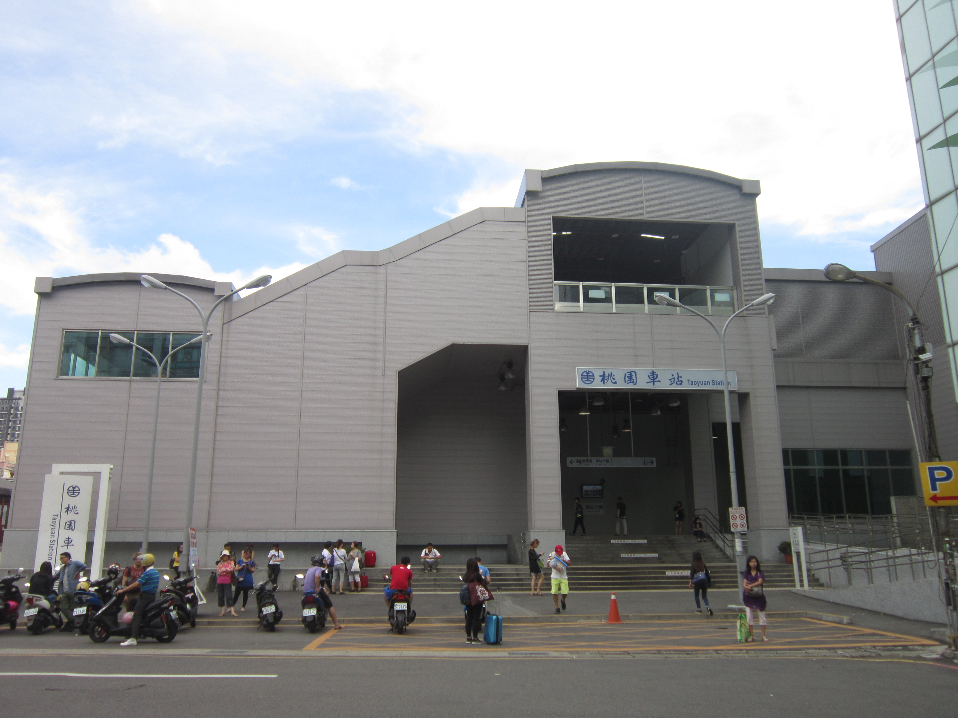 台鐵桃園車站位於前站的另一個出入口